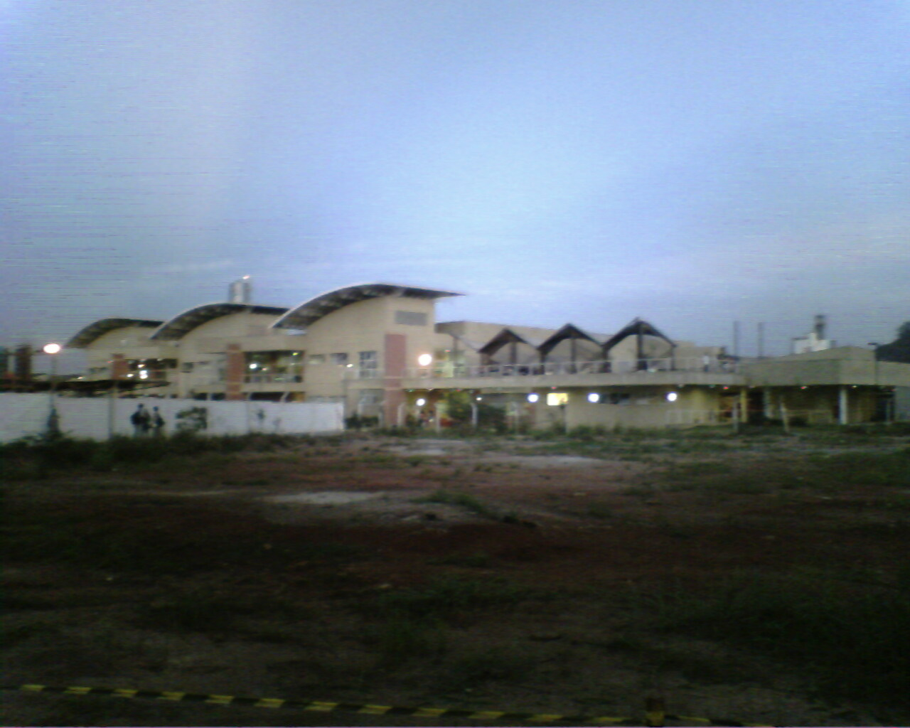 Description: Didatic Sector of "Arts Science and Hummanities School - University of Sao Paulo" (Setor Didatico da Escola de Artes Ciências e Humanidades - Universidade de São Paulo) Author: Bruno Bicalho Date: March 30, 2007 Camera: Mobile Phone Gradiente GF-500